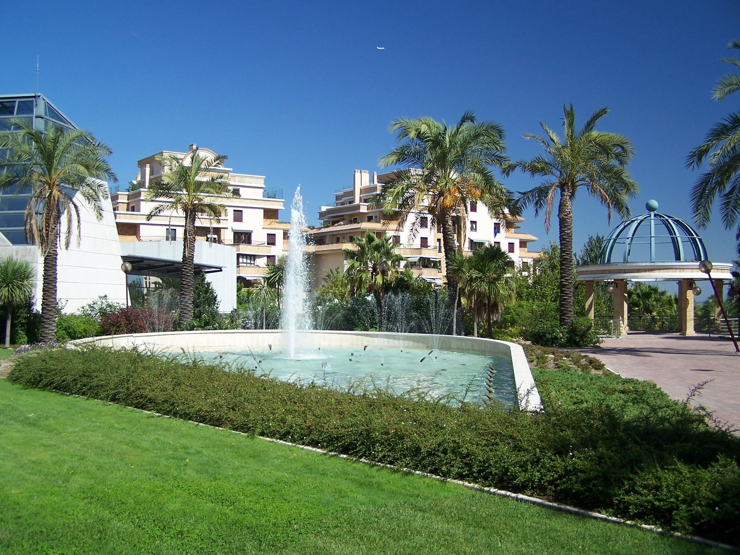 Real Forte, Sacavem I / /